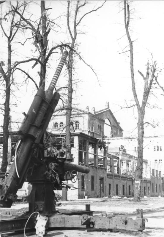 ADN/ZB/Donath Berlin Die im II. Weltkrieg zerstörte Staatsoper am Platz der Republik (Krolloper) Westberlin. Aufn. 1945